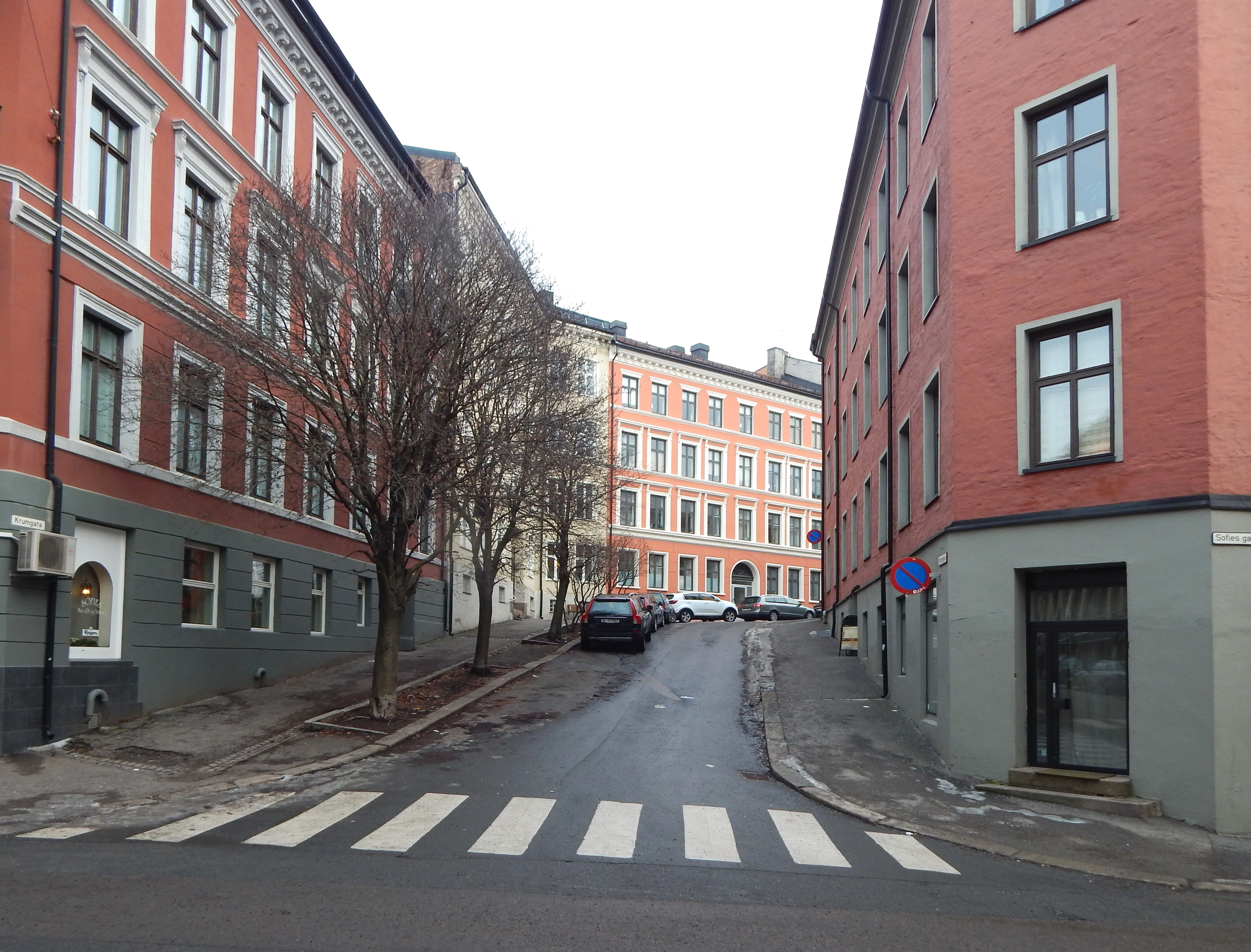 Vestre del av Krumgata